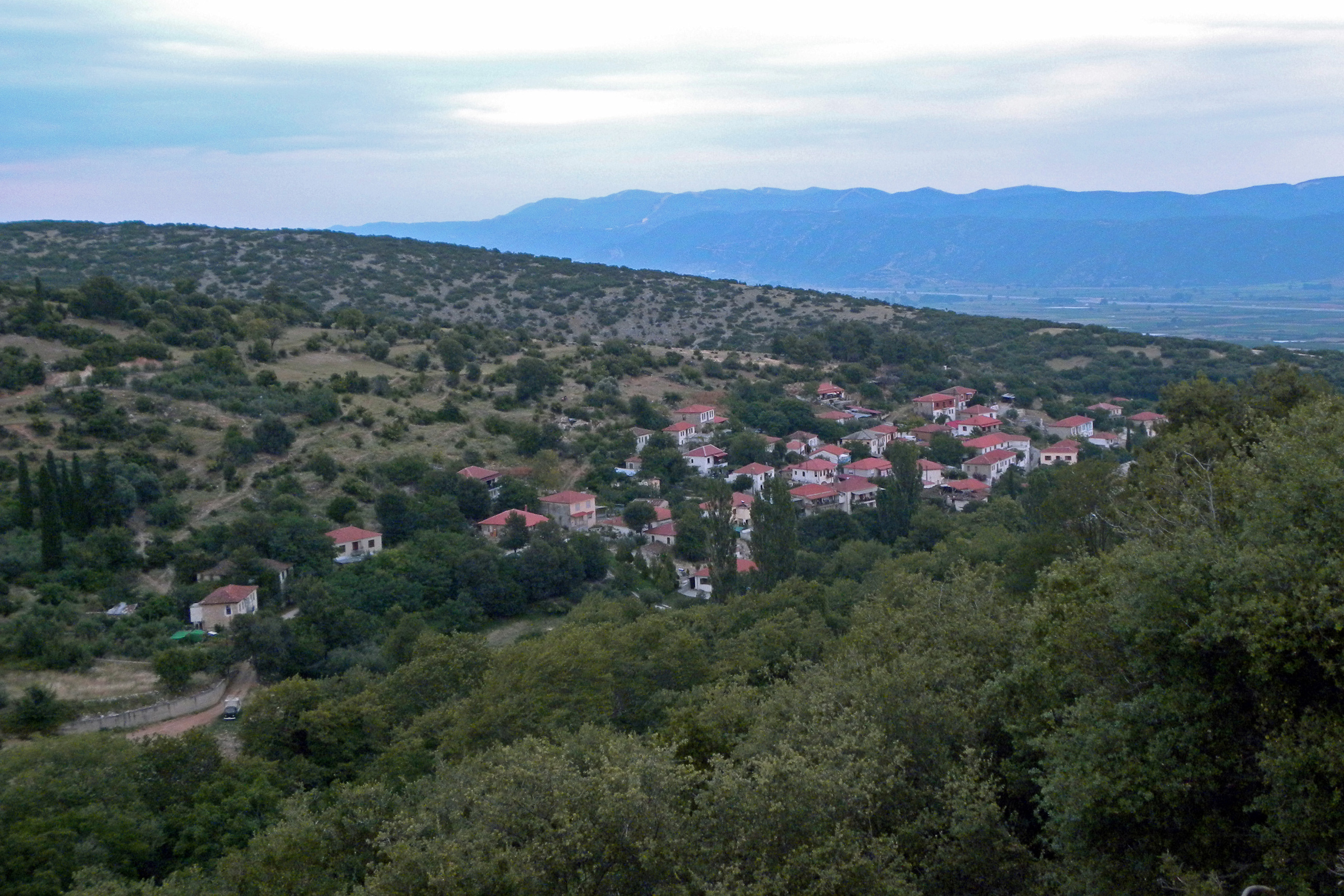 Ποδοχώρι